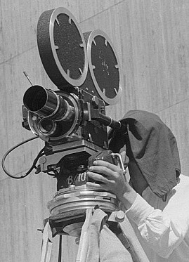 Original image description from the Deutsche FotothekZwei Kameramänner